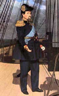 King Frederik 7. onboard Slesvig